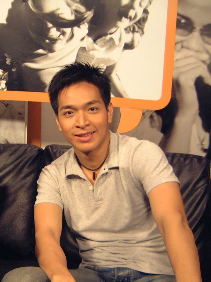 Pattarapol Silapajarn -ภัทรพล ศิลปาจารย์ (พอล)